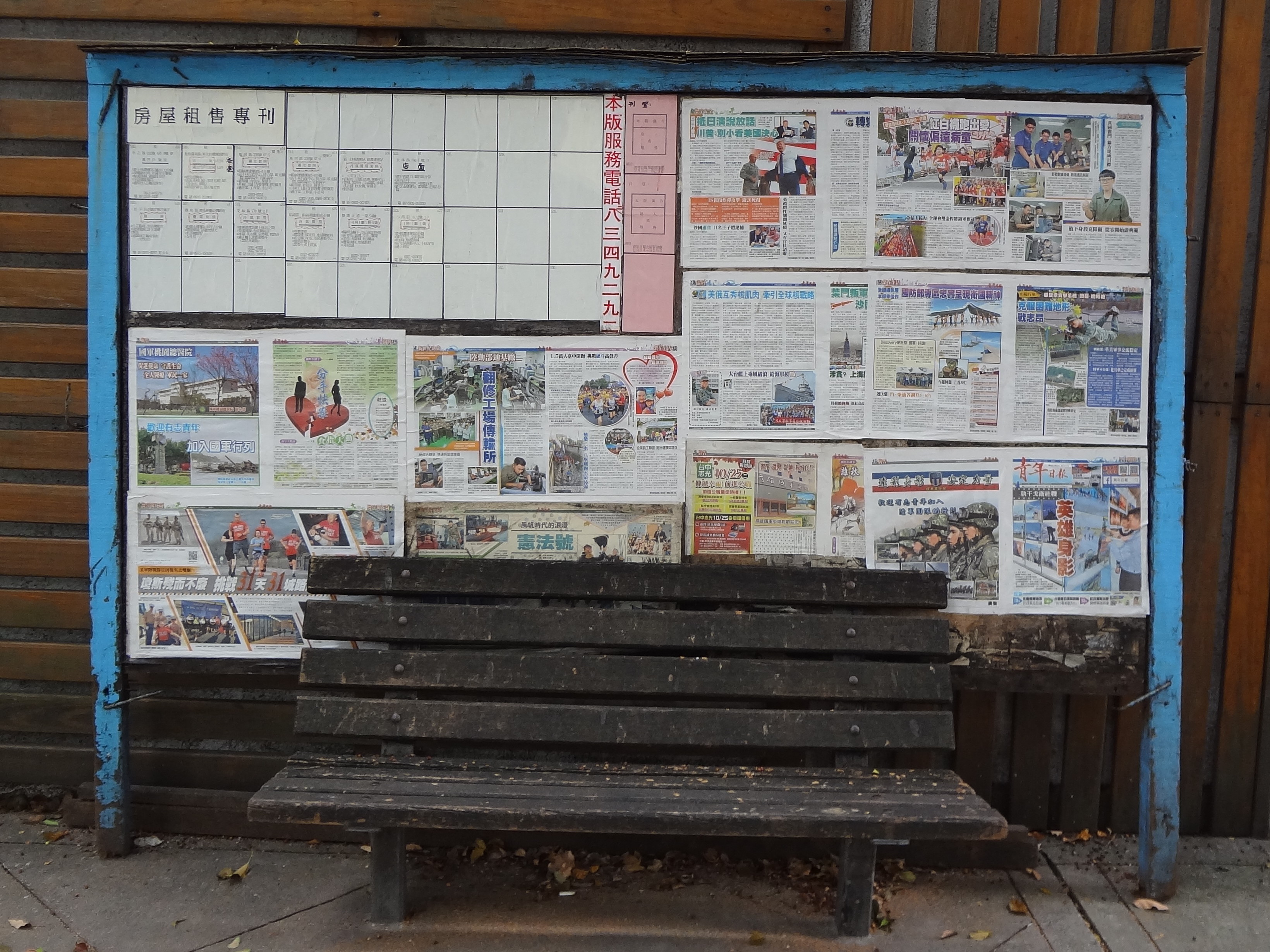 臺北市士林區中山北路五段復興廣播電臺總臺下方，青年日報社北區管理處公布欄免費提供閱覽《青年日報》當日內容，同時提供房屋租售與求才廣告。